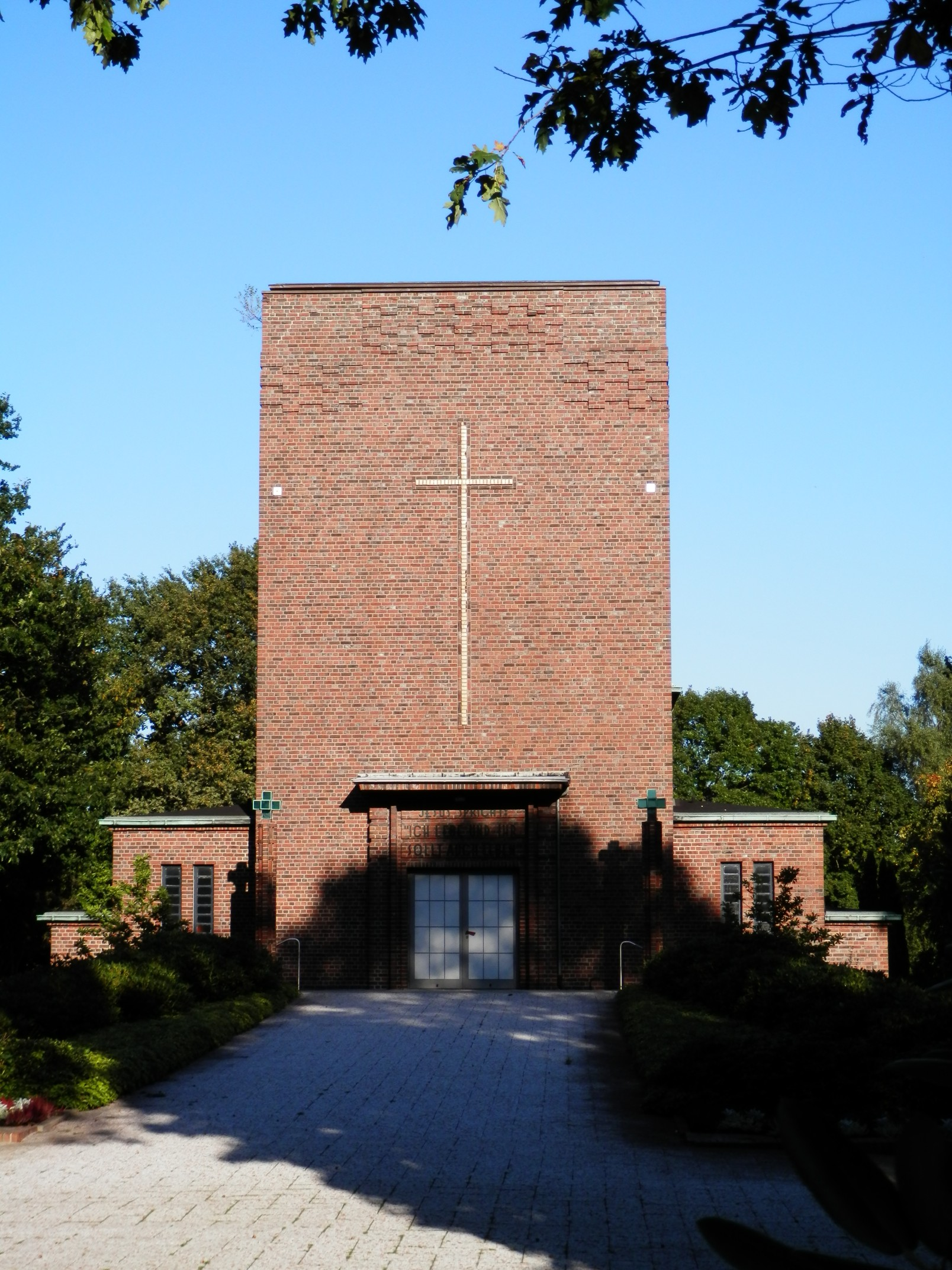 Friedhofskapelle der ev. luth. Gemeinde Geestemünde in Bremerhaven, Feldstraße 15-27Das abgebildete Objekt ist ein geschütztes Kulturdenkmal in der Freien Hansestadt Bremen, mit der Nr. 3056 beim Landesamt für Denkmalpflege registriert.